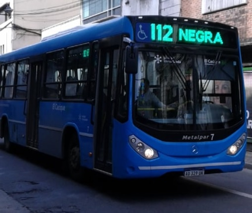 Mercedes-Benz de la línea 112 de Rosario